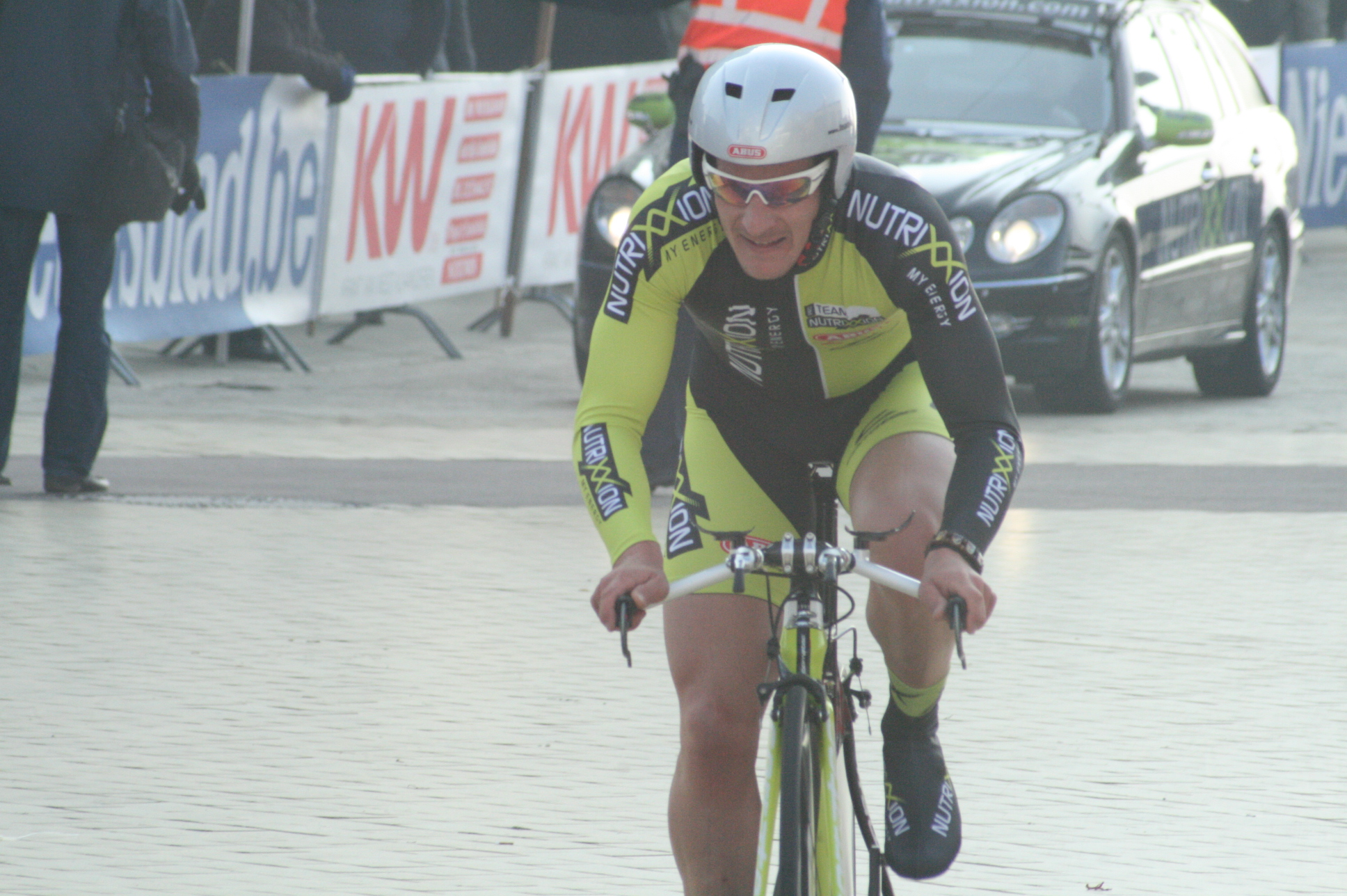 Driedaagse van West-Vlaanderen 2011, proloog in Middelkerke